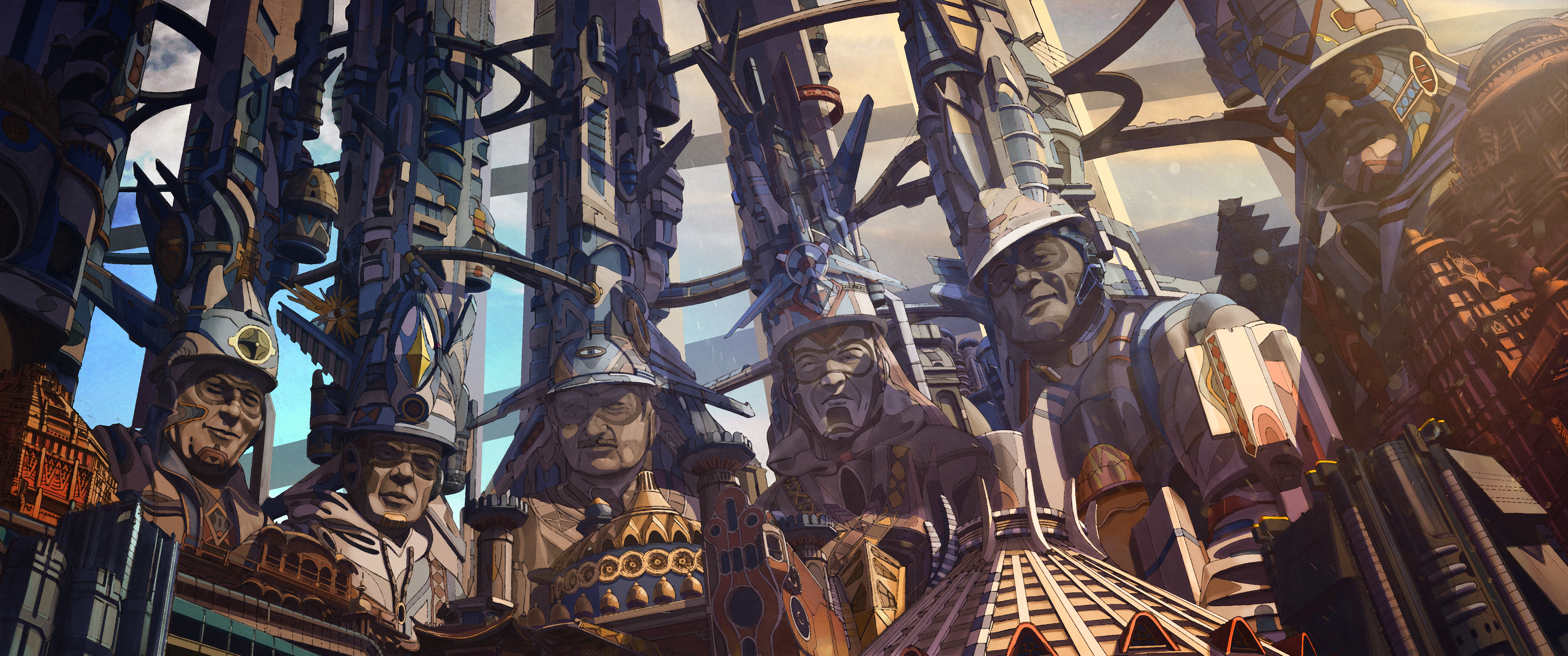 imaginary city